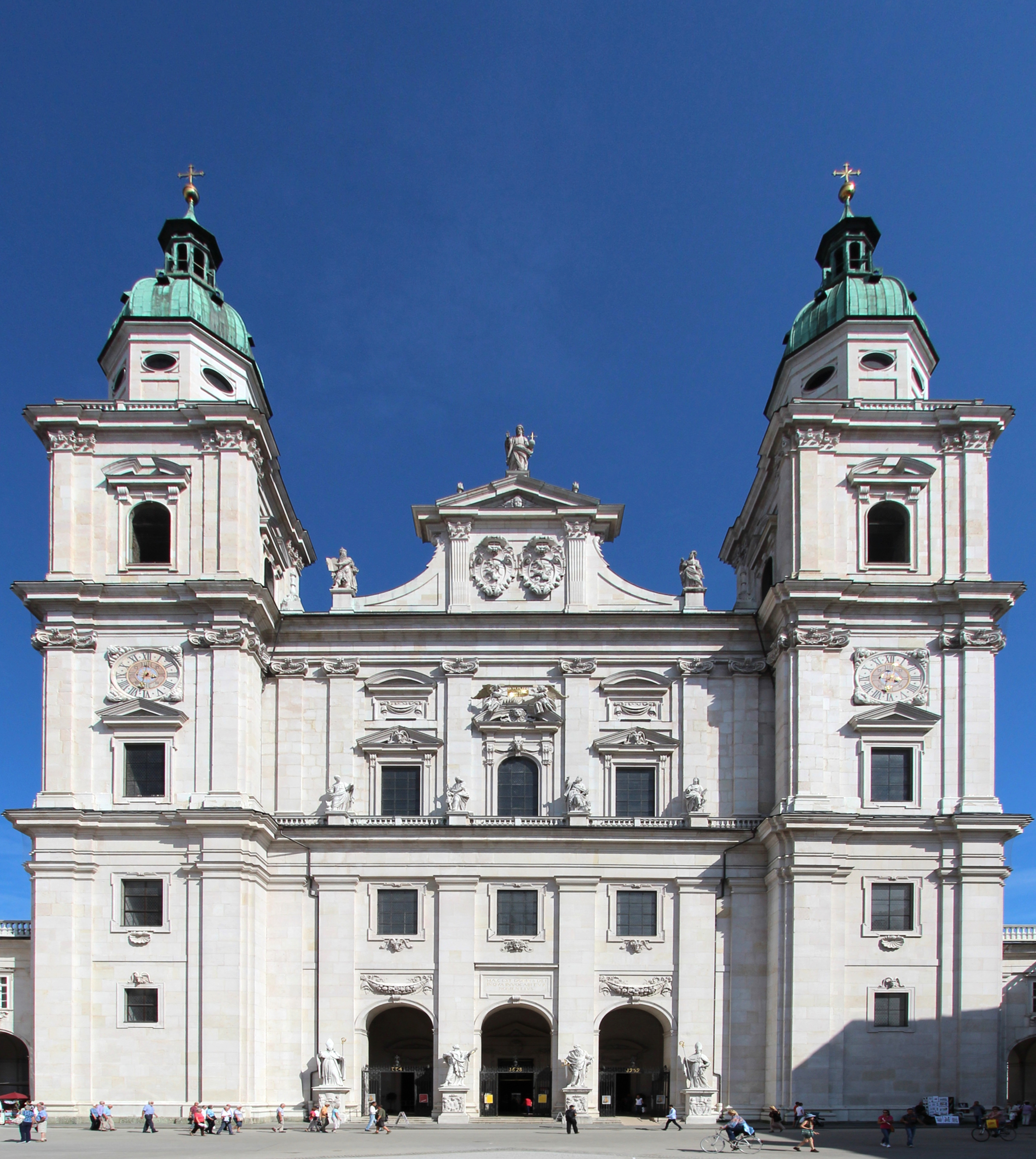 Fassade des Salzburger Doms 2014